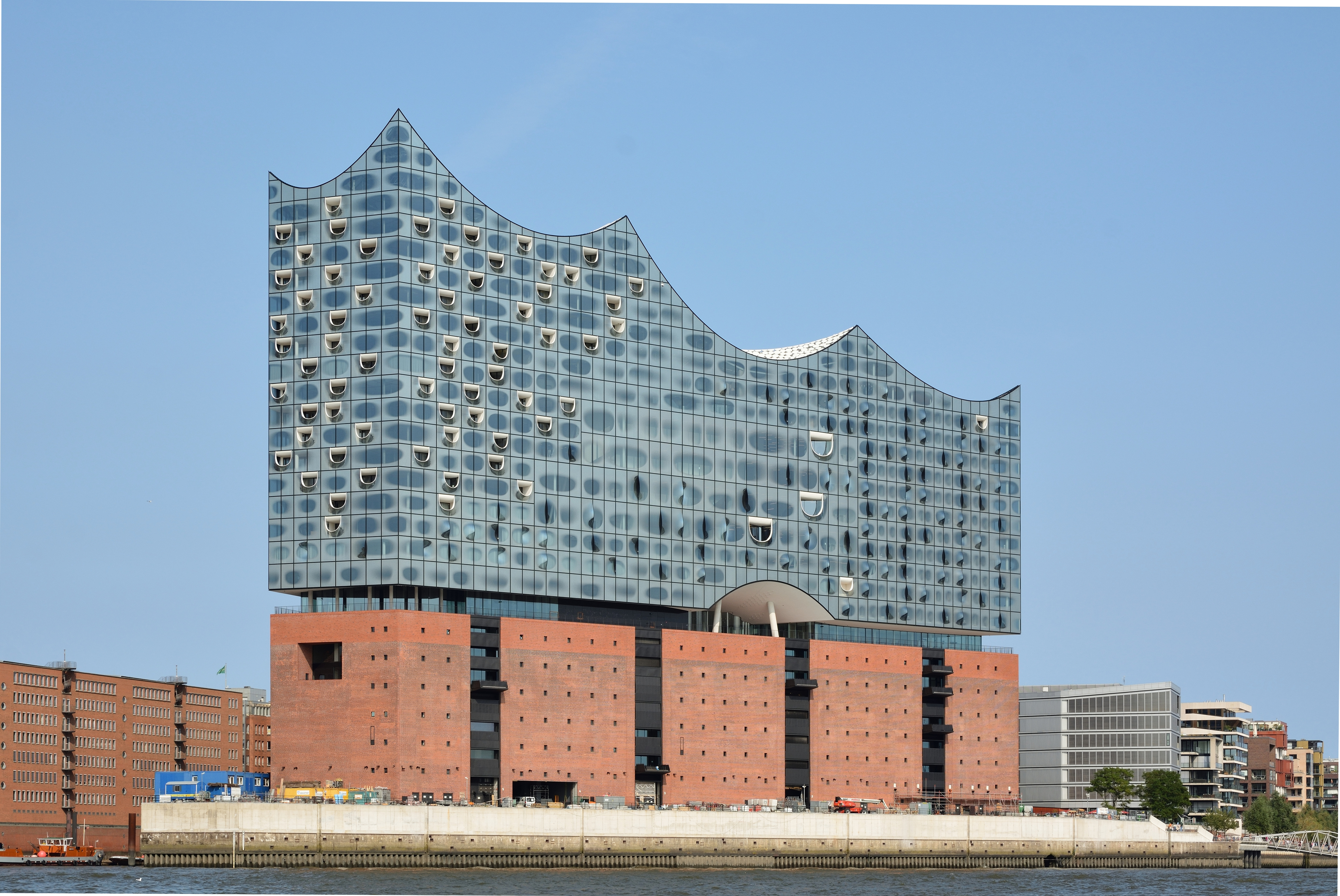 Impressionen einer Barkassenfahrt im August 2016 durch den Hamburger Hafen.